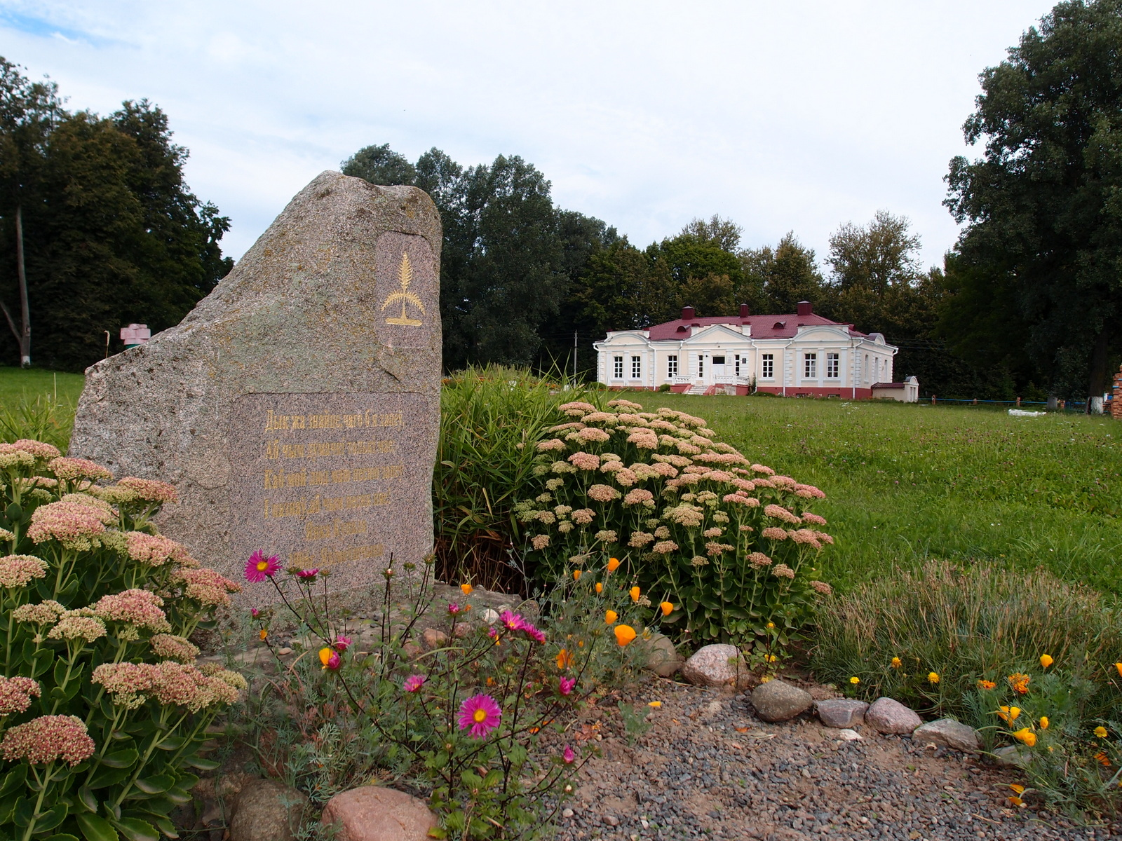 Jachimoŭščyna village